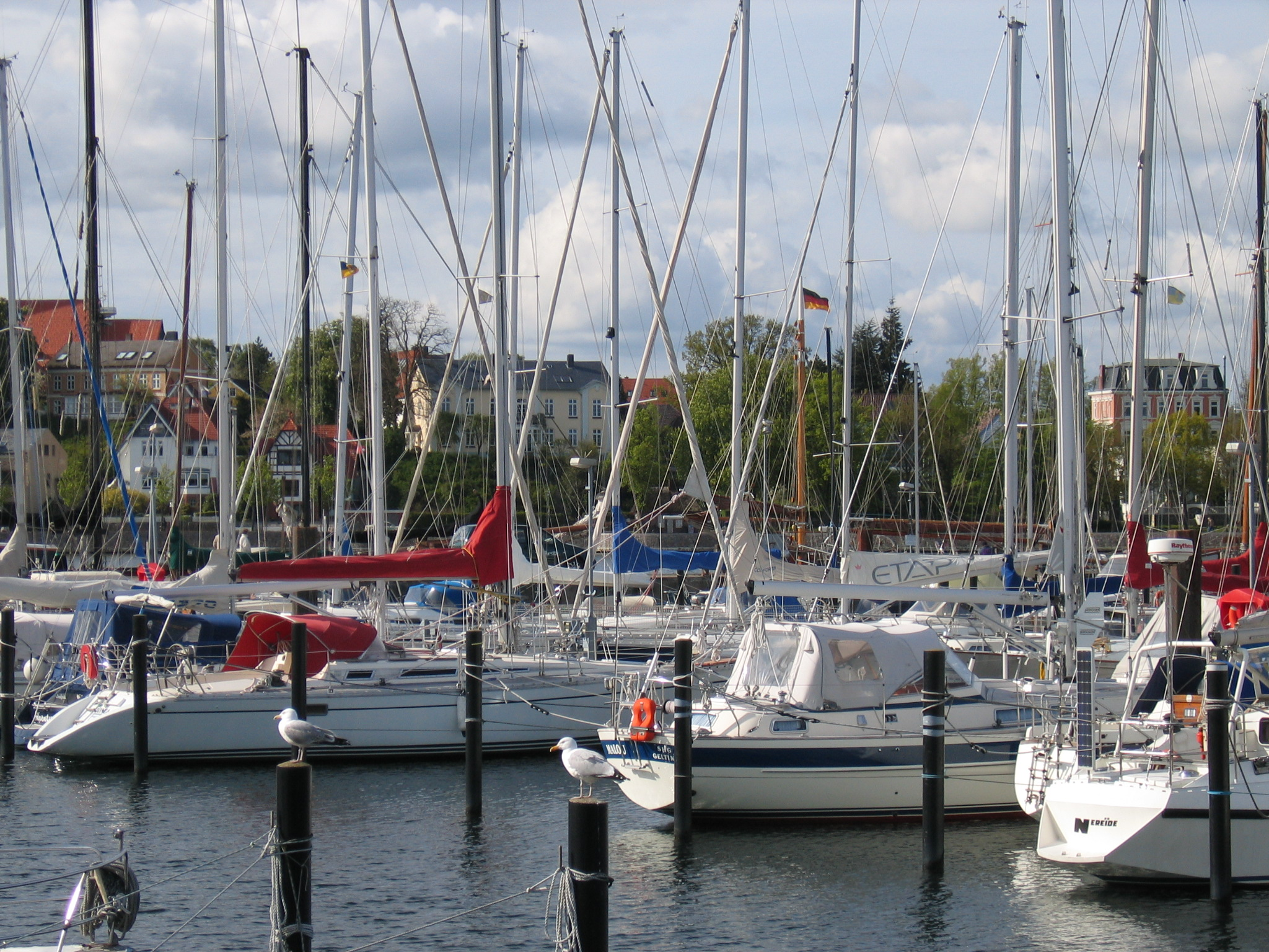 Eckernförde Segelhafen